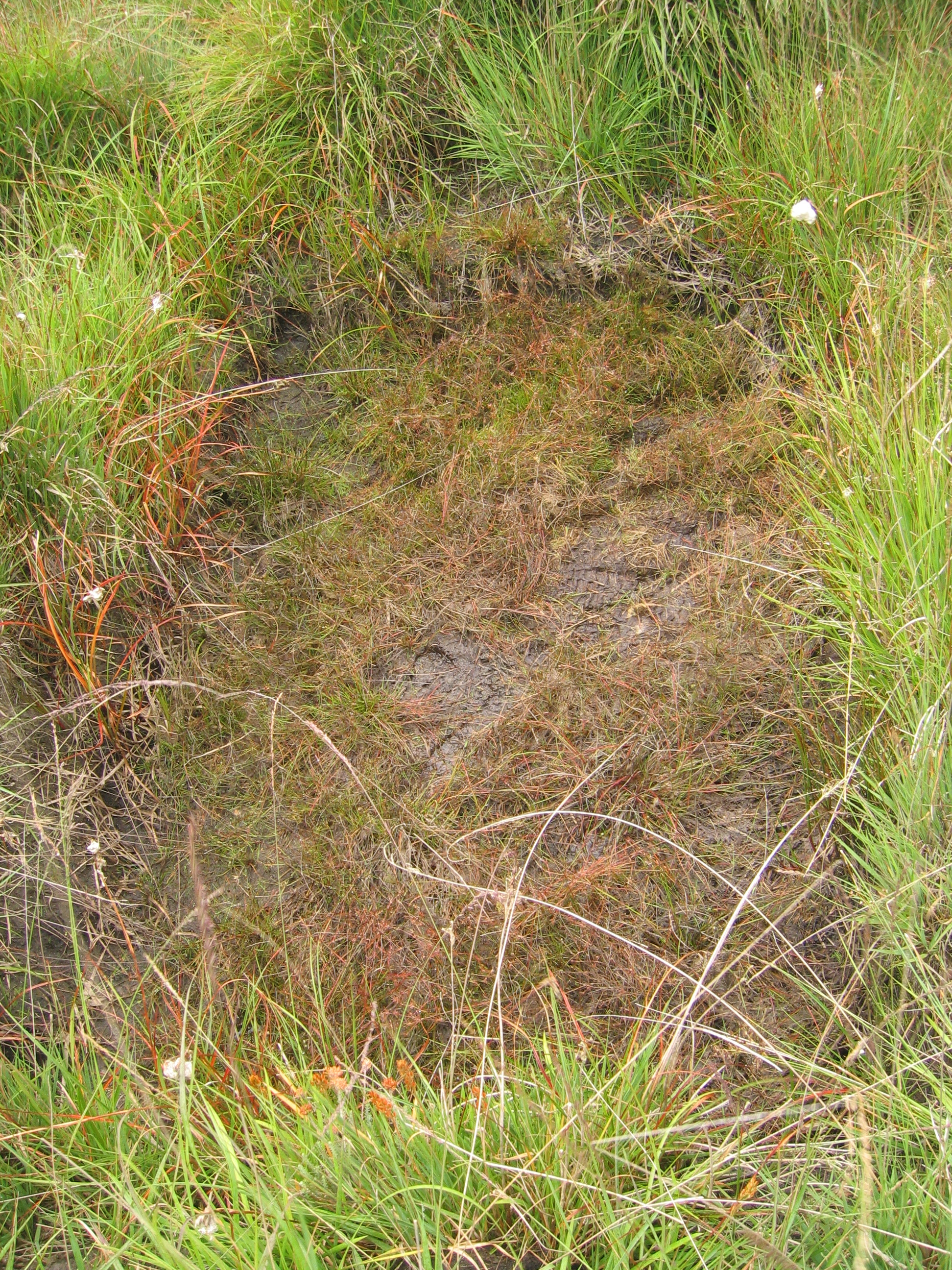 Vue de la tourbière du Venec à Brennilis qui occupe une surface de 48 hectares sur les bords du réservoir Saint-Michel ; ancienne fosse à tourbe.